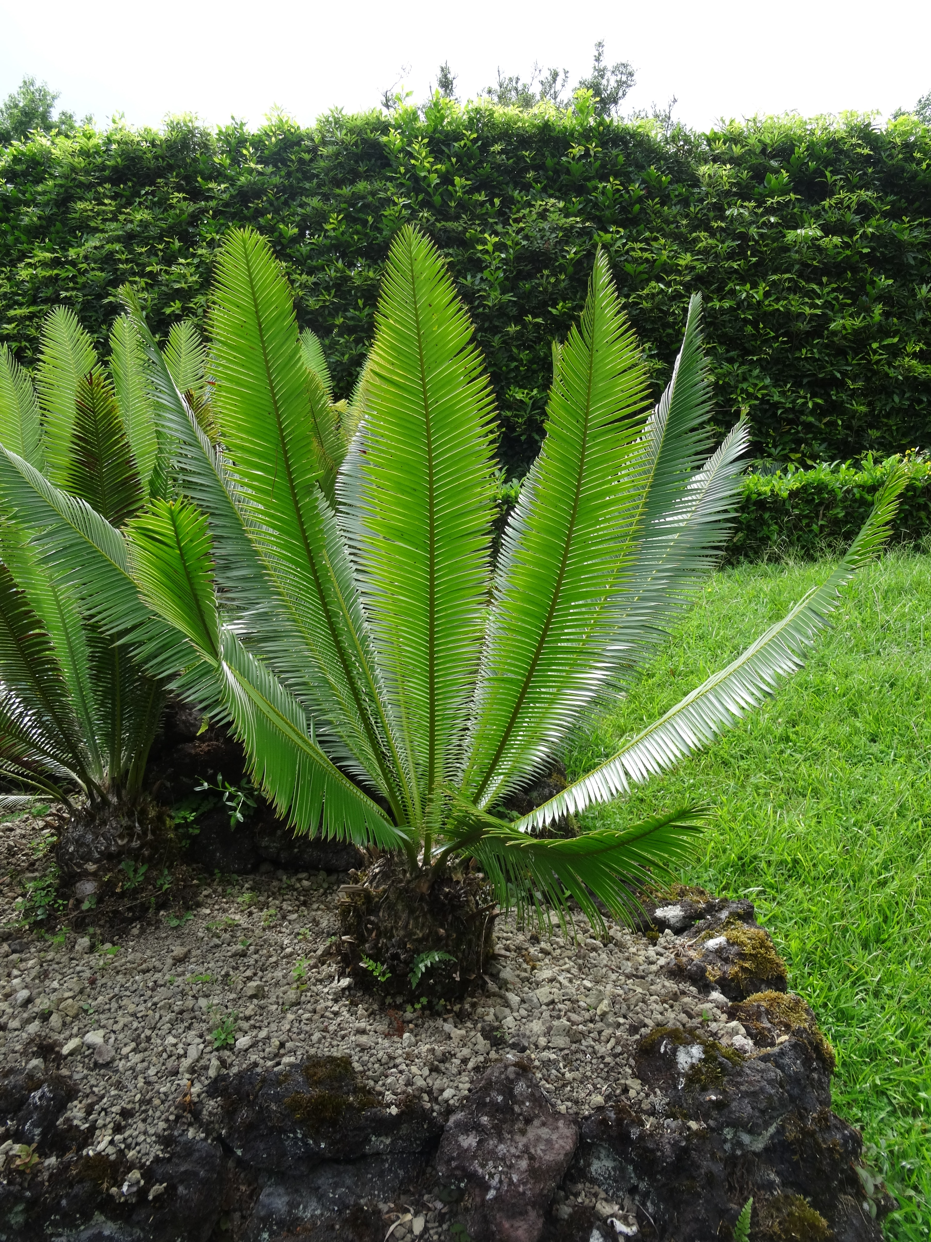 Dioon edule, Parque Terra Nostra, Furnas, Azoren